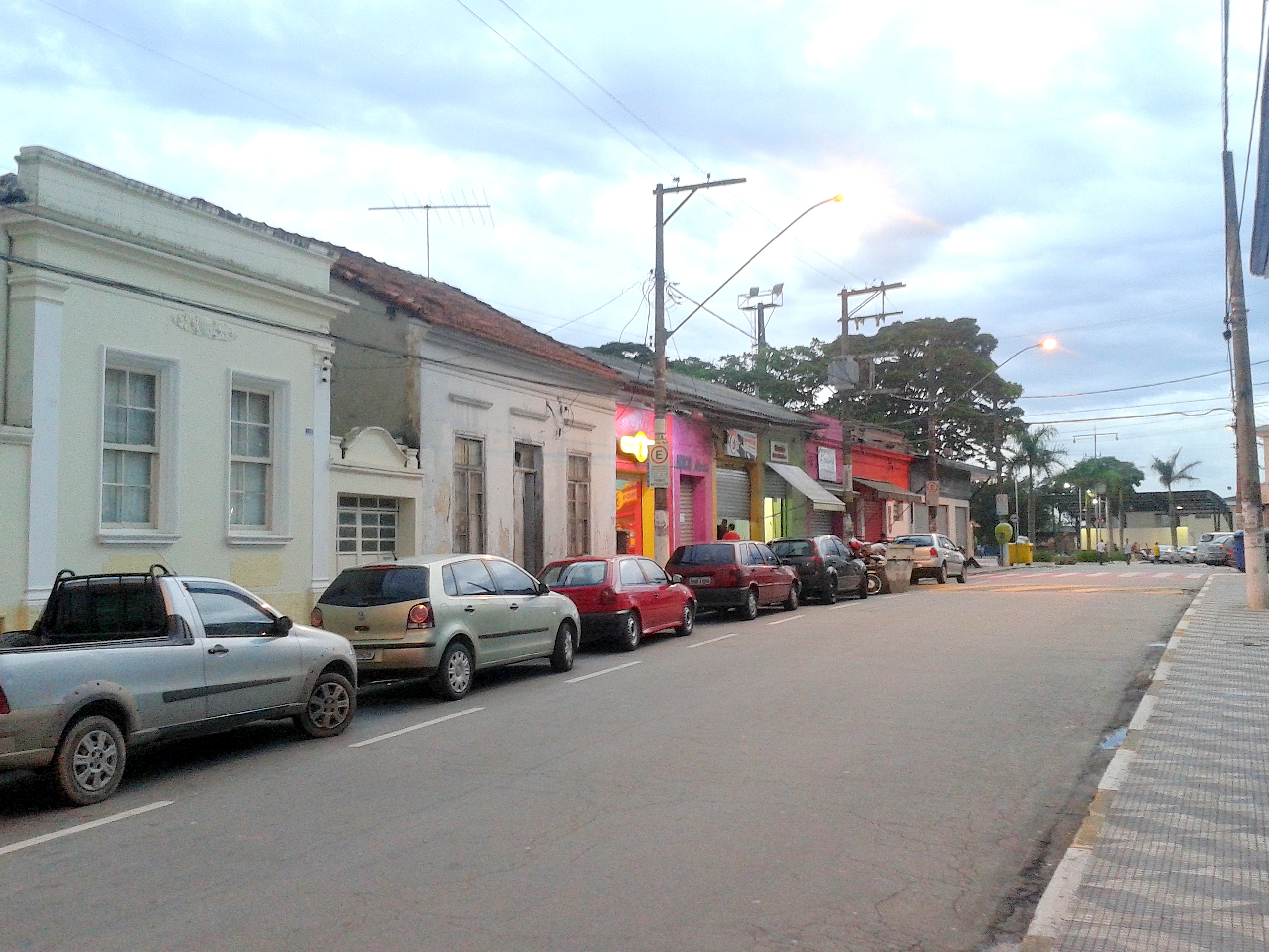 Rua no Centro de Cotia, SP, Brasil.